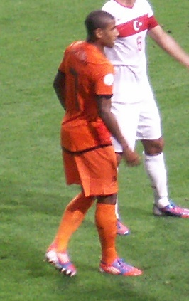 Luciano Narsingh